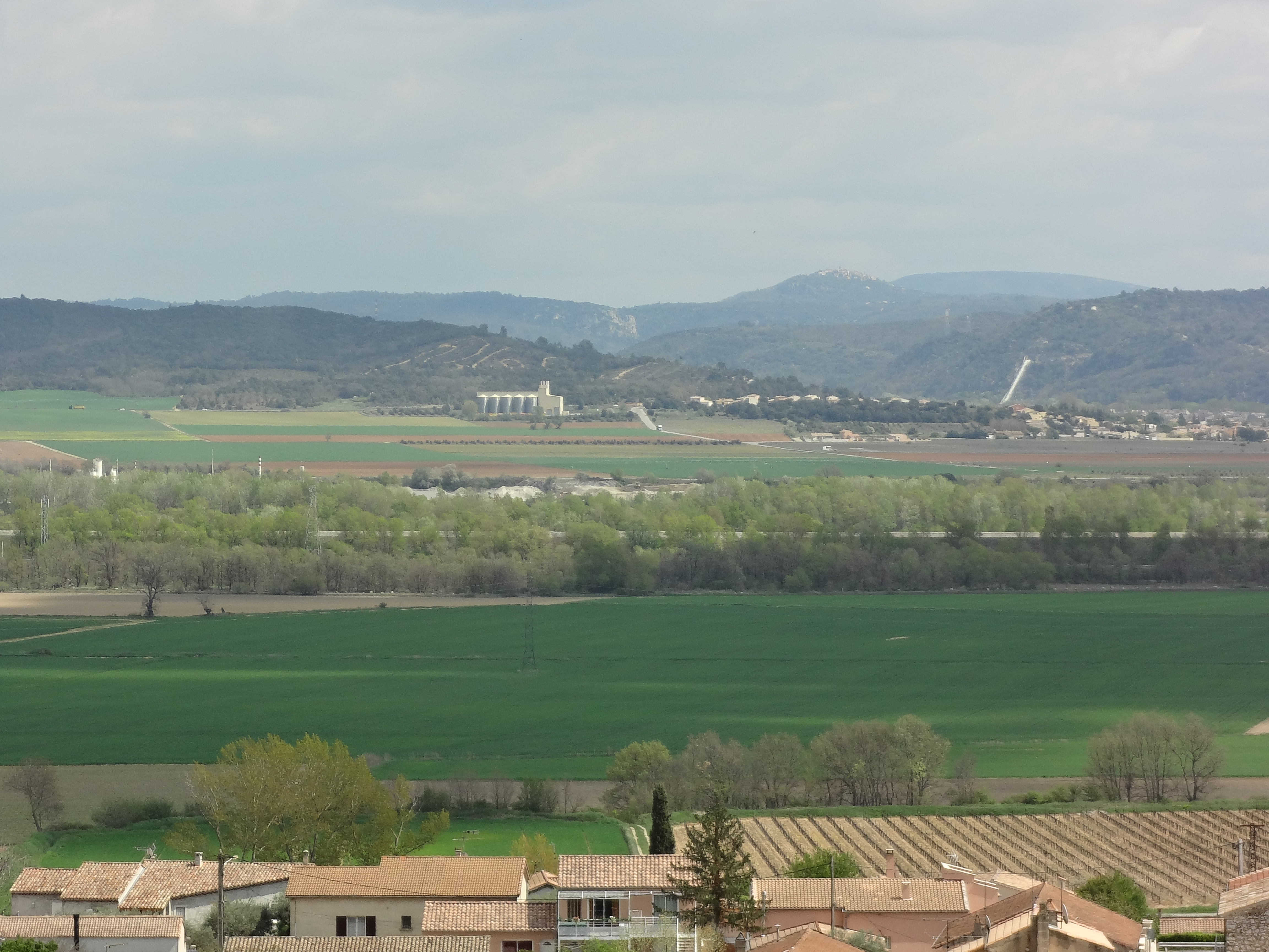 Coopérative agricole de Vinon-sur-Verdon vue de Corbières